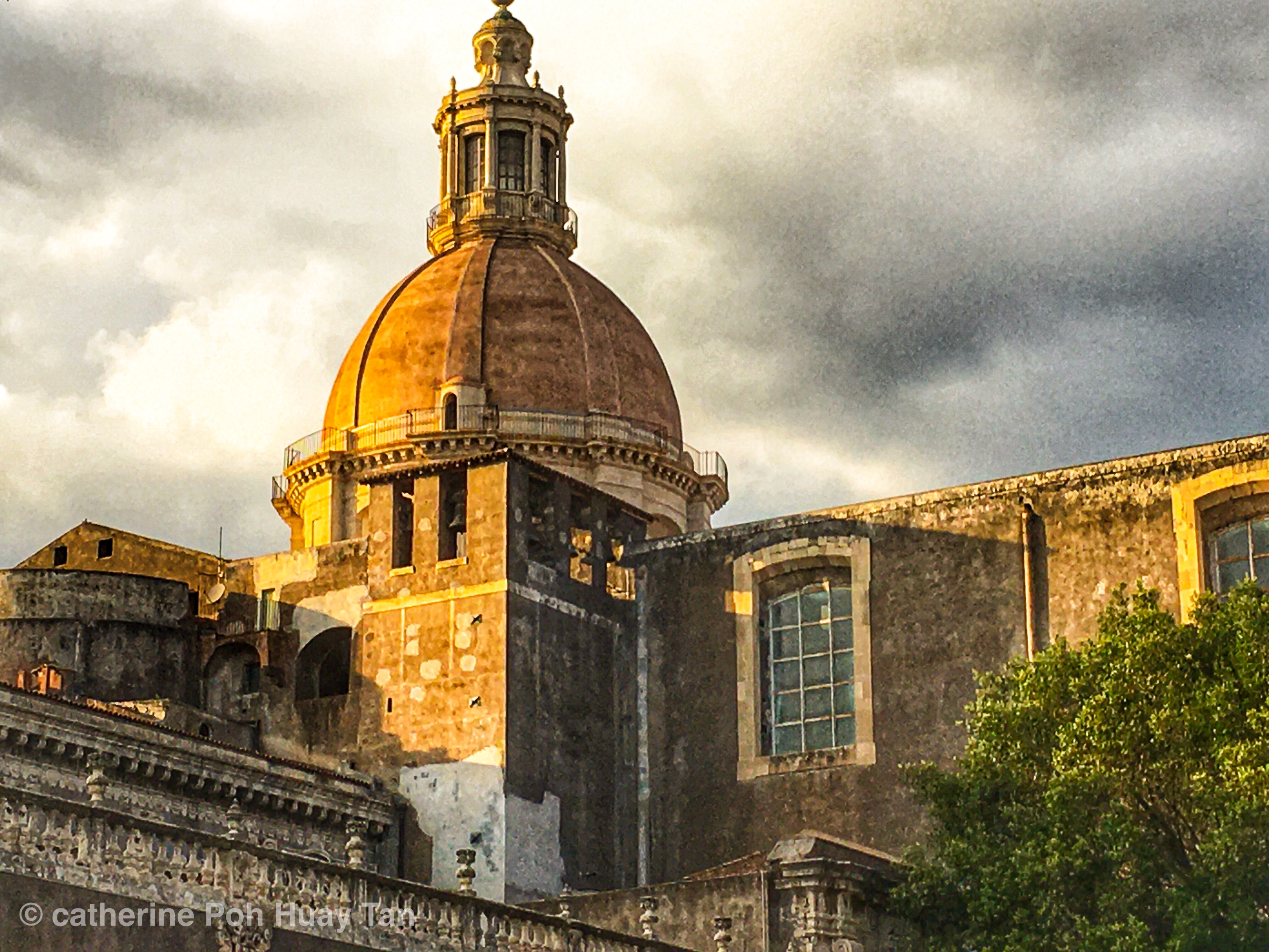 Piazza Dante, Catania, Sicily